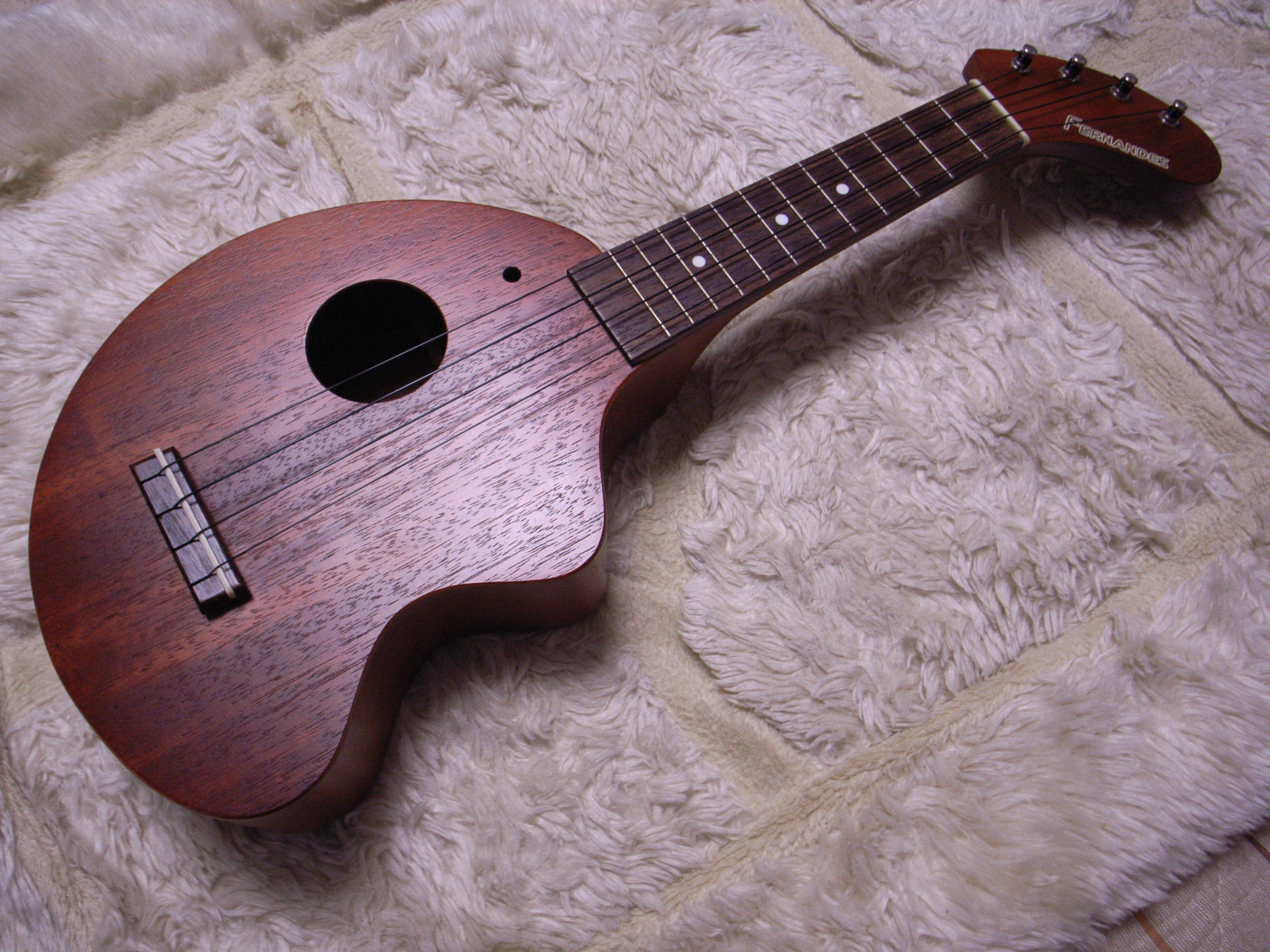 Fernandes Zolele (2001)